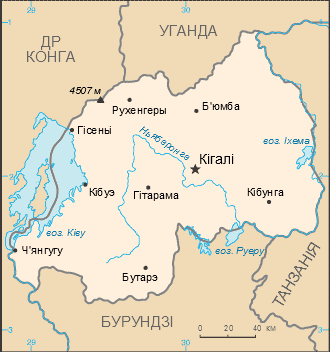 Карта Руанды